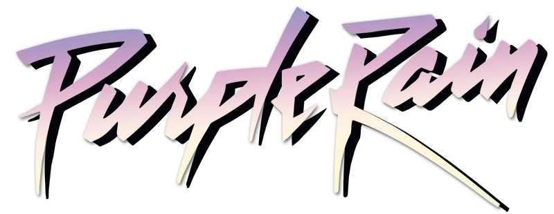 Logo del álbum y película de Prince Purple Rain de 1984.